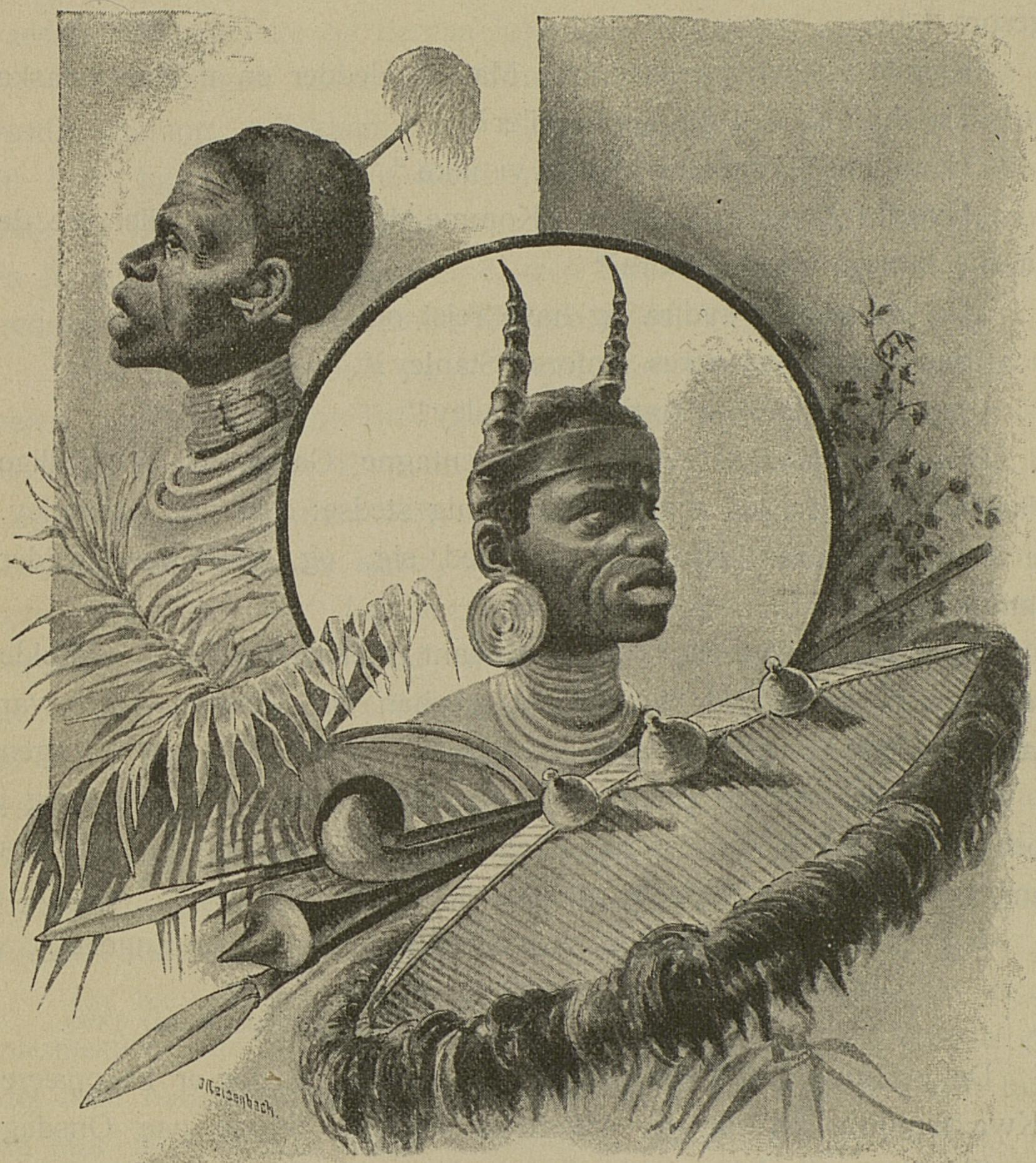 Illustrasjon hentet fra boken "Den tyske Emin Pascha-Expedition" av Peters, Carl og utgitt av Forlagsbureauet (Kjøbenhavn, 1891)